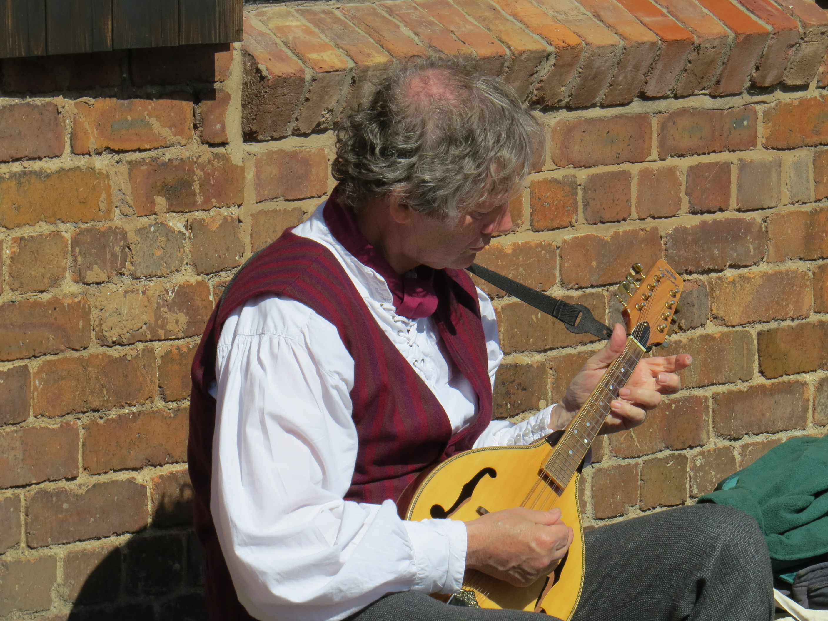 Teri Duffy, cerddor efo Dawnswyr Delyn, ym Mharc Gwledig Maesglas